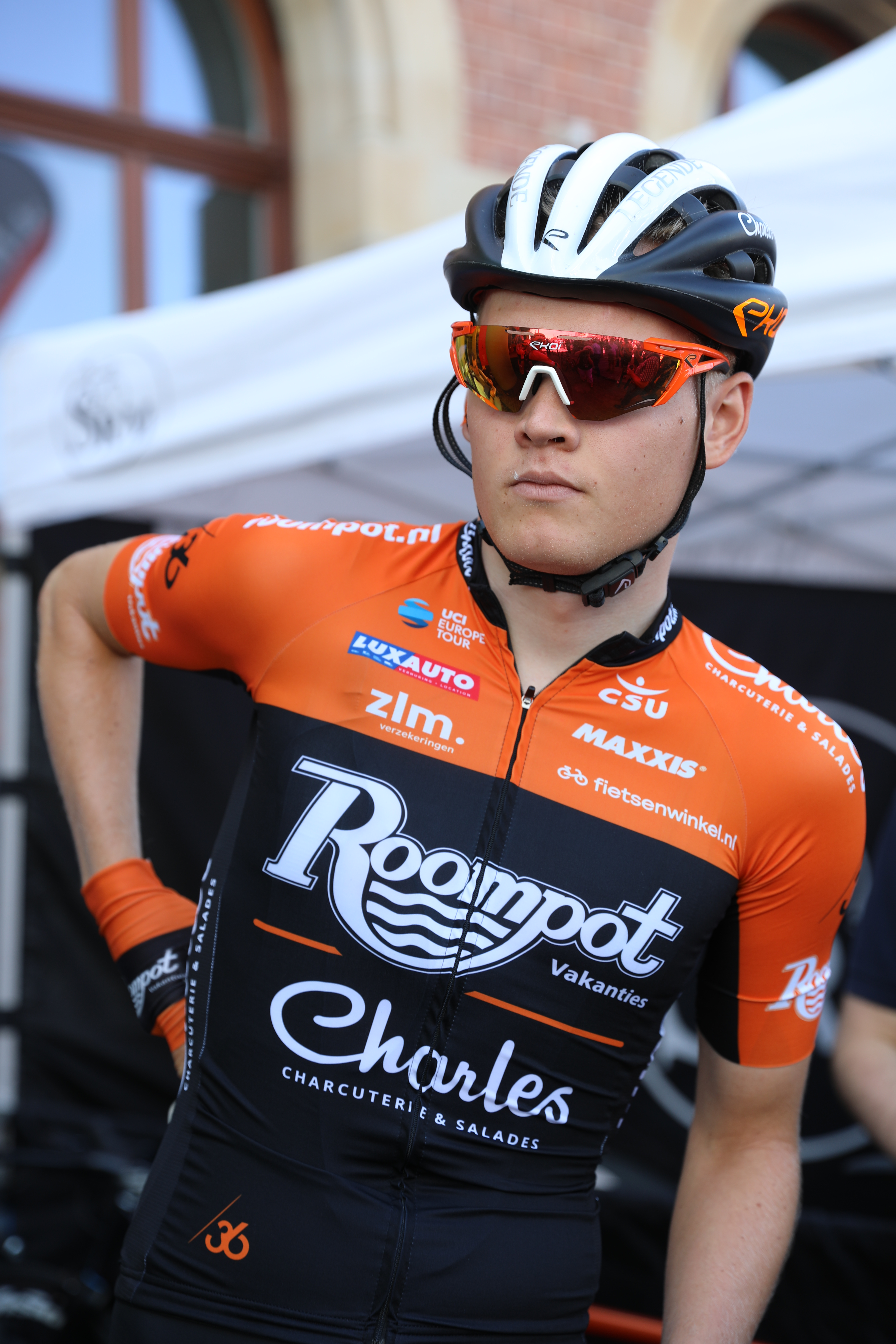 Justin Timmermans, niederländischer Radrennfahrer